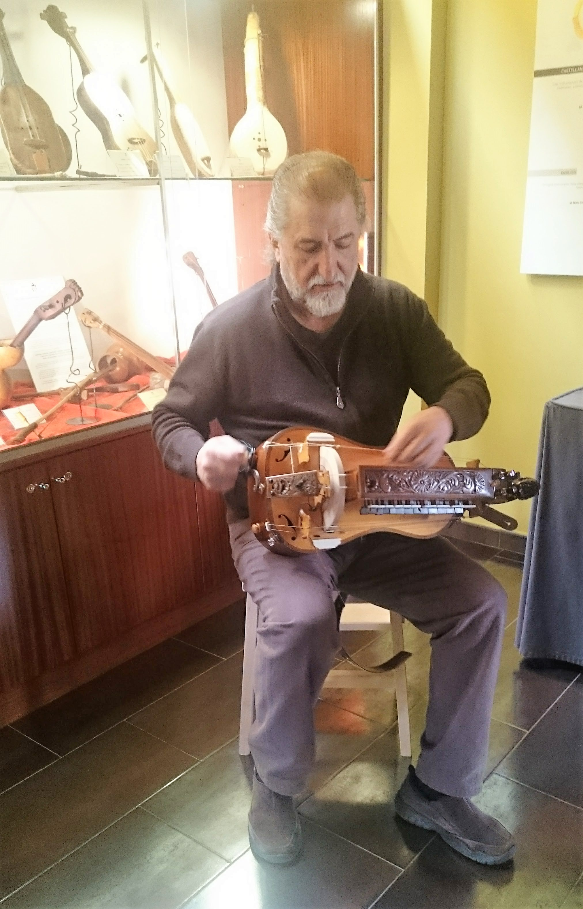 Paco Díez en Museo de Instrumentos Ibéricos tocando una zanfona